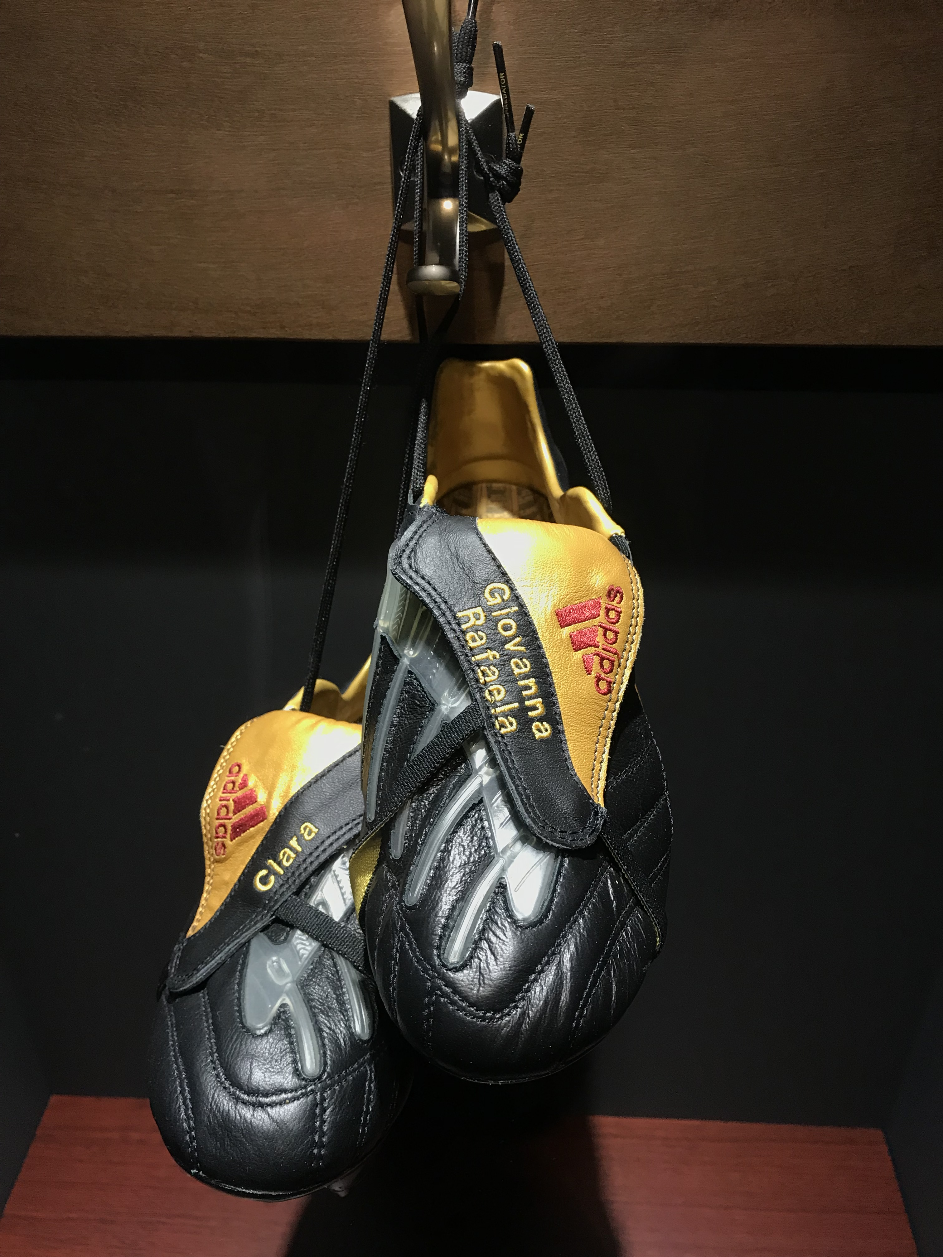 OL Le Musée au Parc OL.